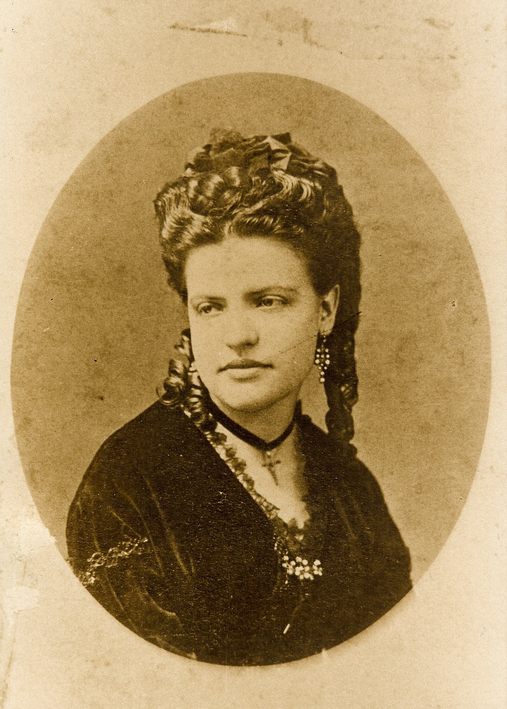 Fotografia de album de arbol familiar.